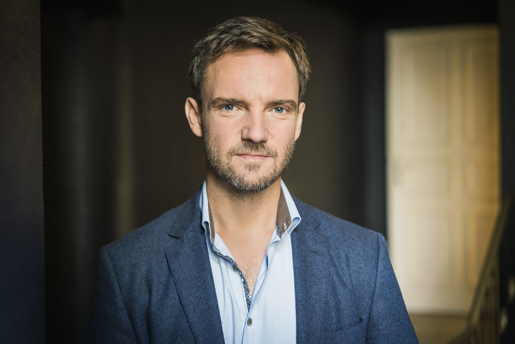 Dominik Schiefner